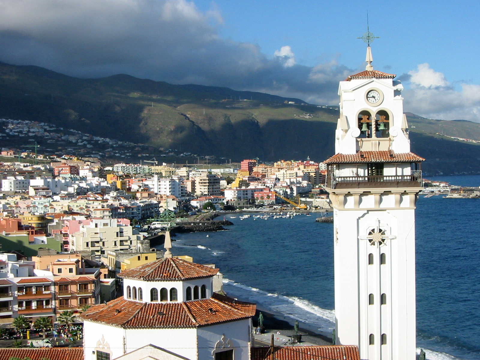 Basílica y Vista de Candelaria